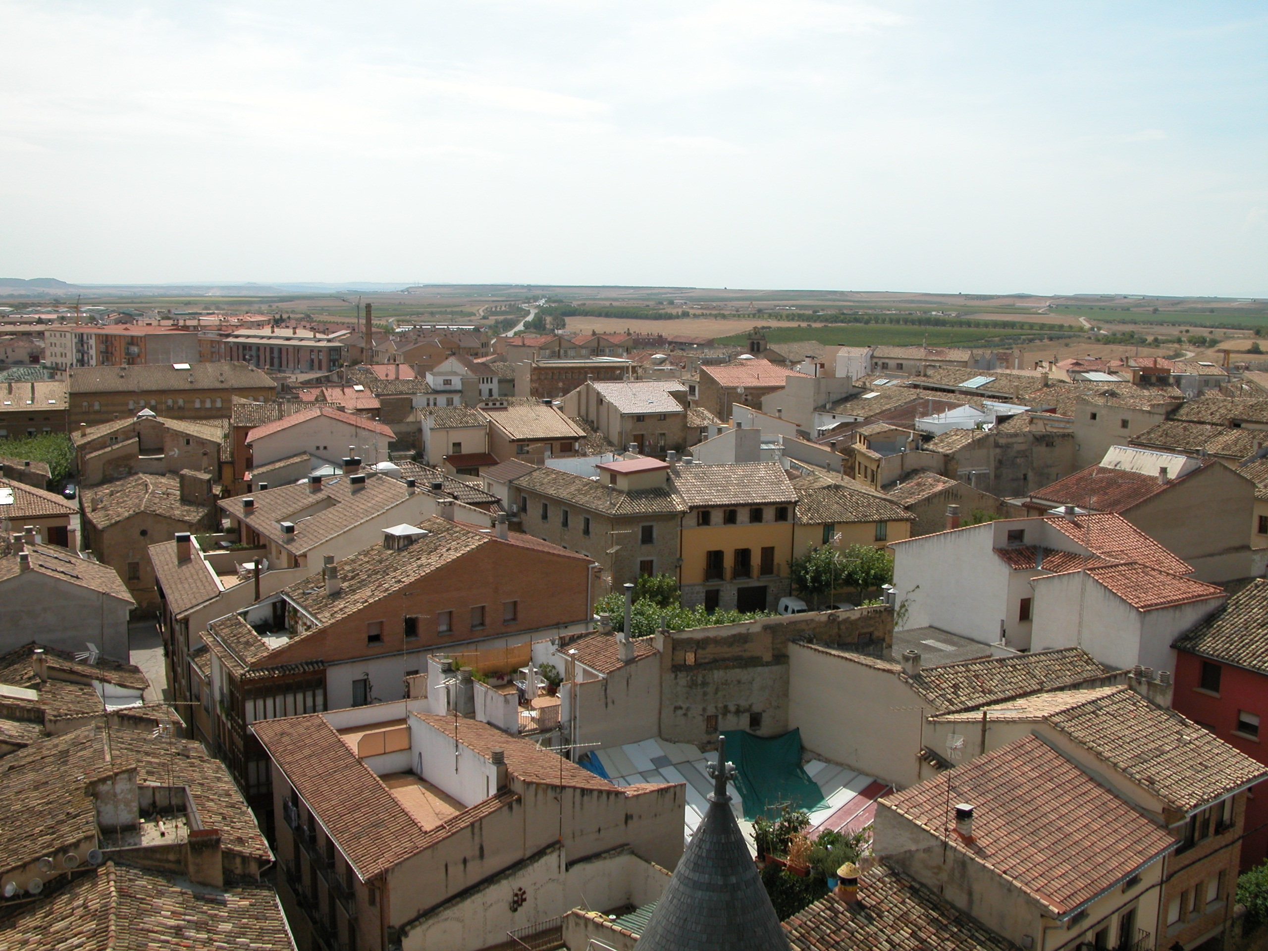 Ville de Olite vue du Chateau